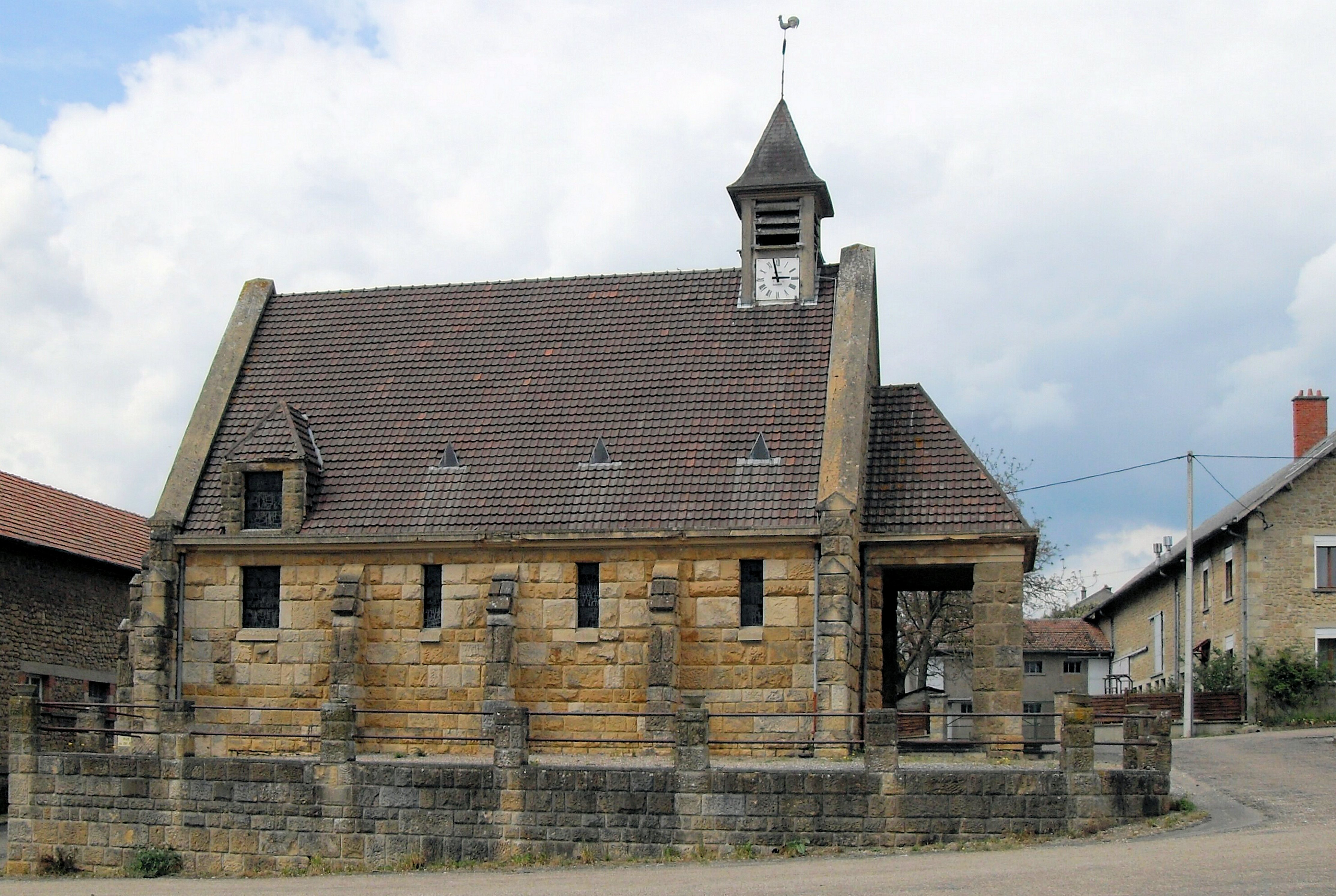 L'èglise de l'Invention-de-la-Sainte-Croix à Martincourt-sur-Meuse